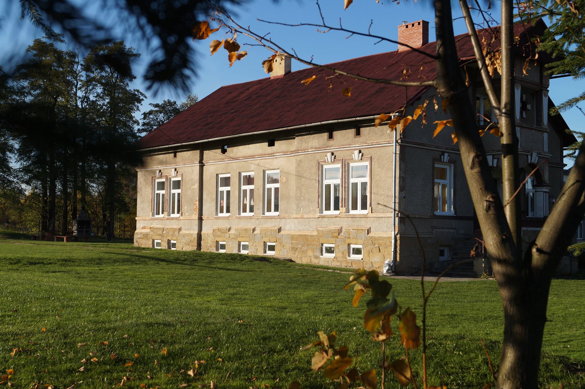 Budynek dworski z początku XIX w.